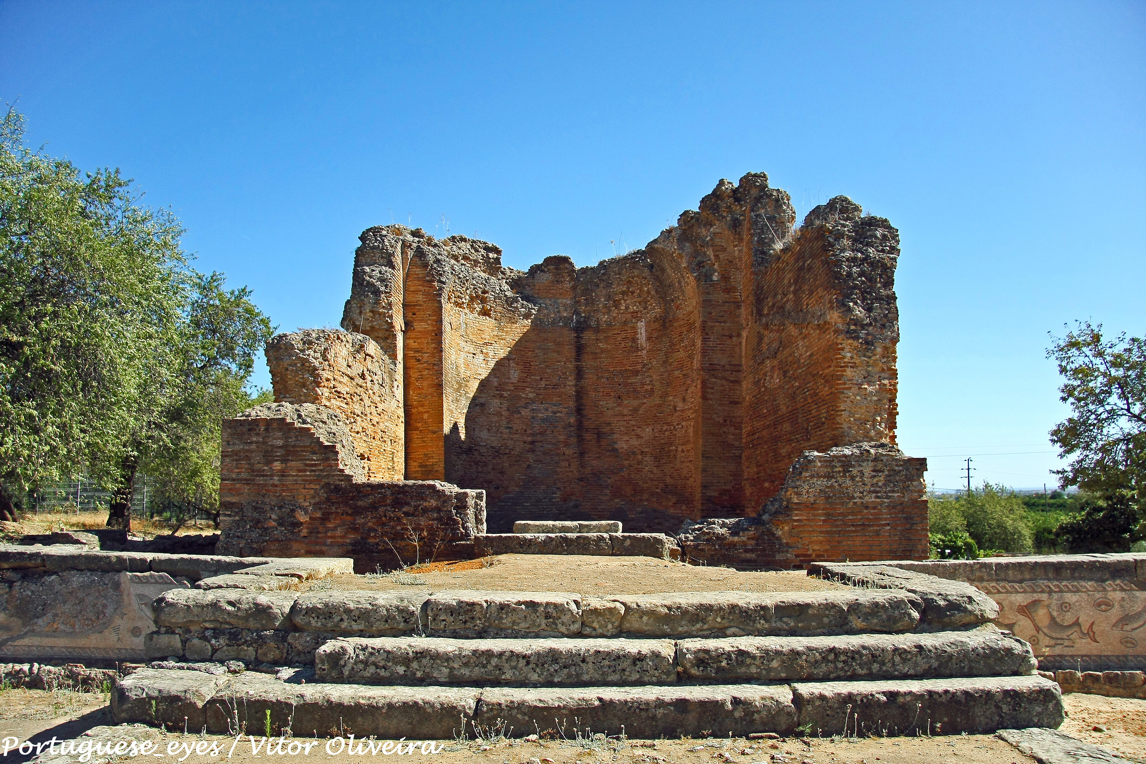 Localizada a poente da aldeia histórica de Estoi, a 8km de Faro, a Villa Romana de Milreu revela uma ocupação continuada desde o séculoI e até ao século XI. O conhecimento da sua história revela-nos que terá sido habitada por famílias de elevado estatuto social e político, às quais eram proporcionadas as necessidades não só de um quotidiano rural, como também de grande vivência lúdica. No século IV, foi erguido um edifício religioso ricamente decorado e ainda hoje conservado até ao arranque das abóbadas, destinado ao culto privado da família. Cristianizado no séculoVI, o templo serviria também o culto no período islâmico e até ao século XI. Entre os séculos. XVI e XIX, e sobre as divisões privadas da antiga casa romana, foi erguida uma casa rural com contrafortes cilíndricos. A riqueza desta villa rústica está patente no importante volume de achados arqueológicos, como mosaicos de temática predominantemente marinha, revestimentos marmóreos e cerâmicos diversos, estuques pintados e escultura decorativa. See where this picture was taken. [?]